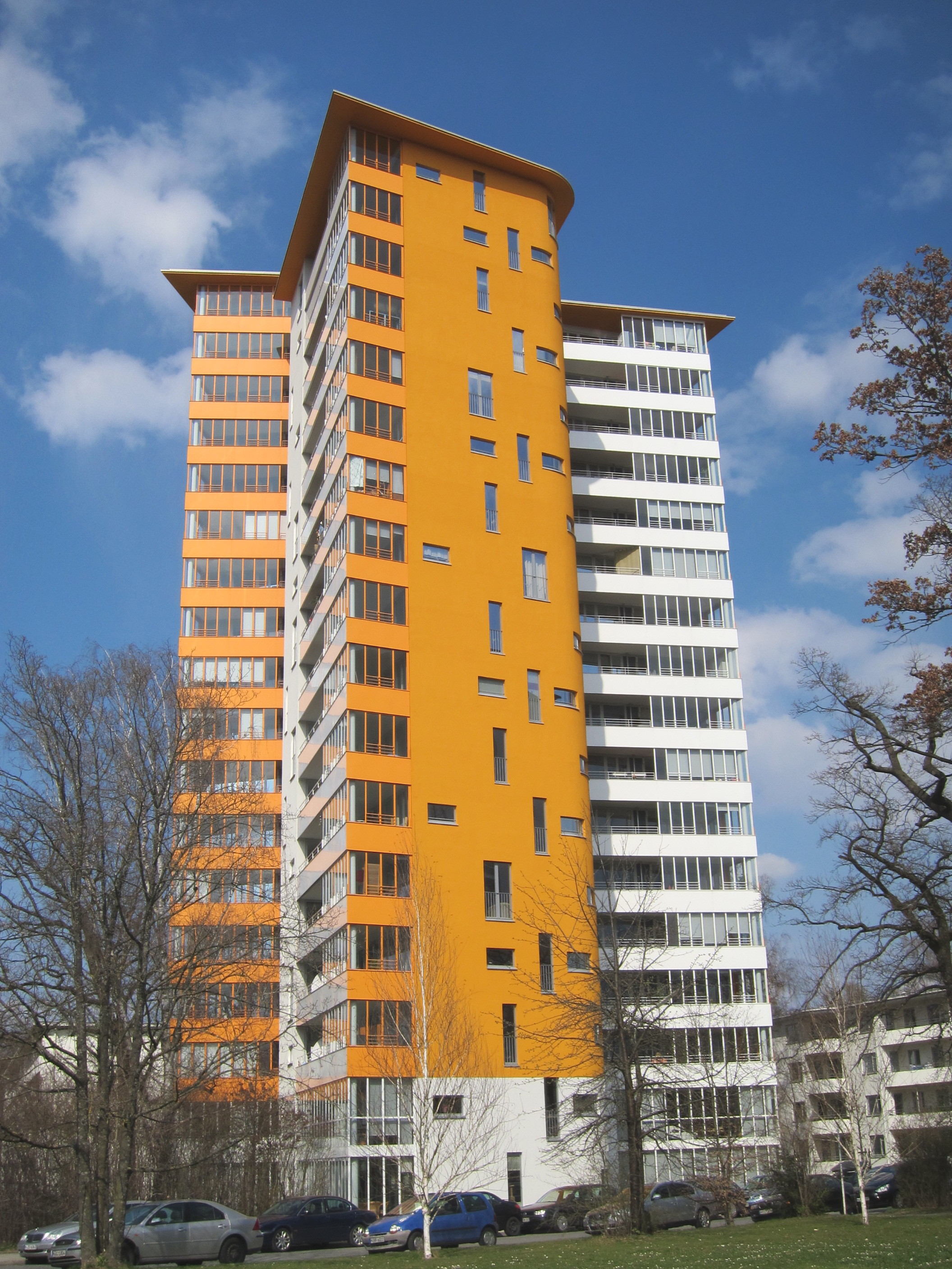 Leo-Graetz-Straße; Sternhaus III; 2005 - 2007 für die Siemens Wohnungsgesellschaft nach Plänen des Architekturbüro Steidle + Partner erbaut.